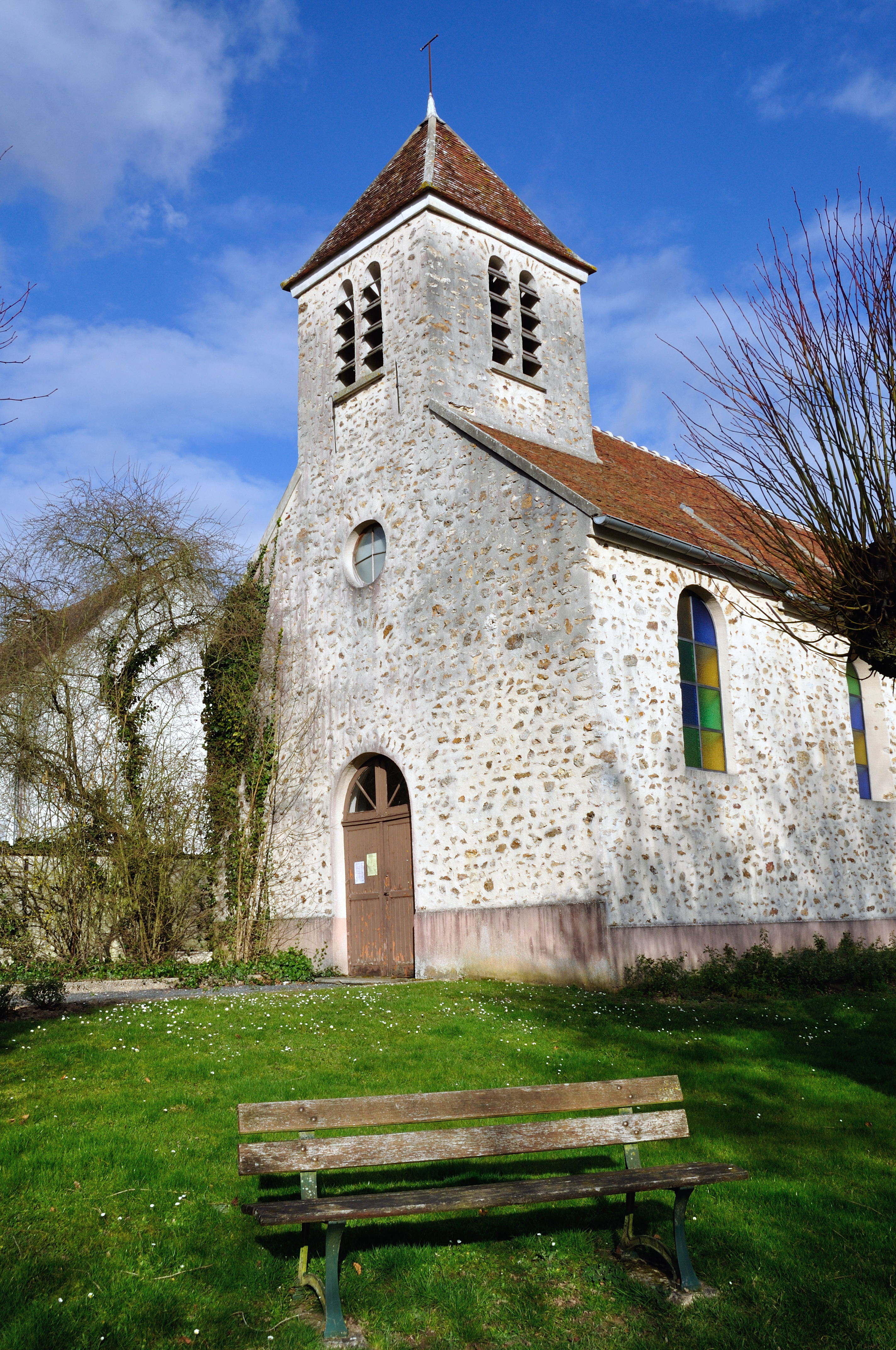 Église Saint-Pierre de Giremoutiers. (Seine-et-Marne, région Île-de-France).